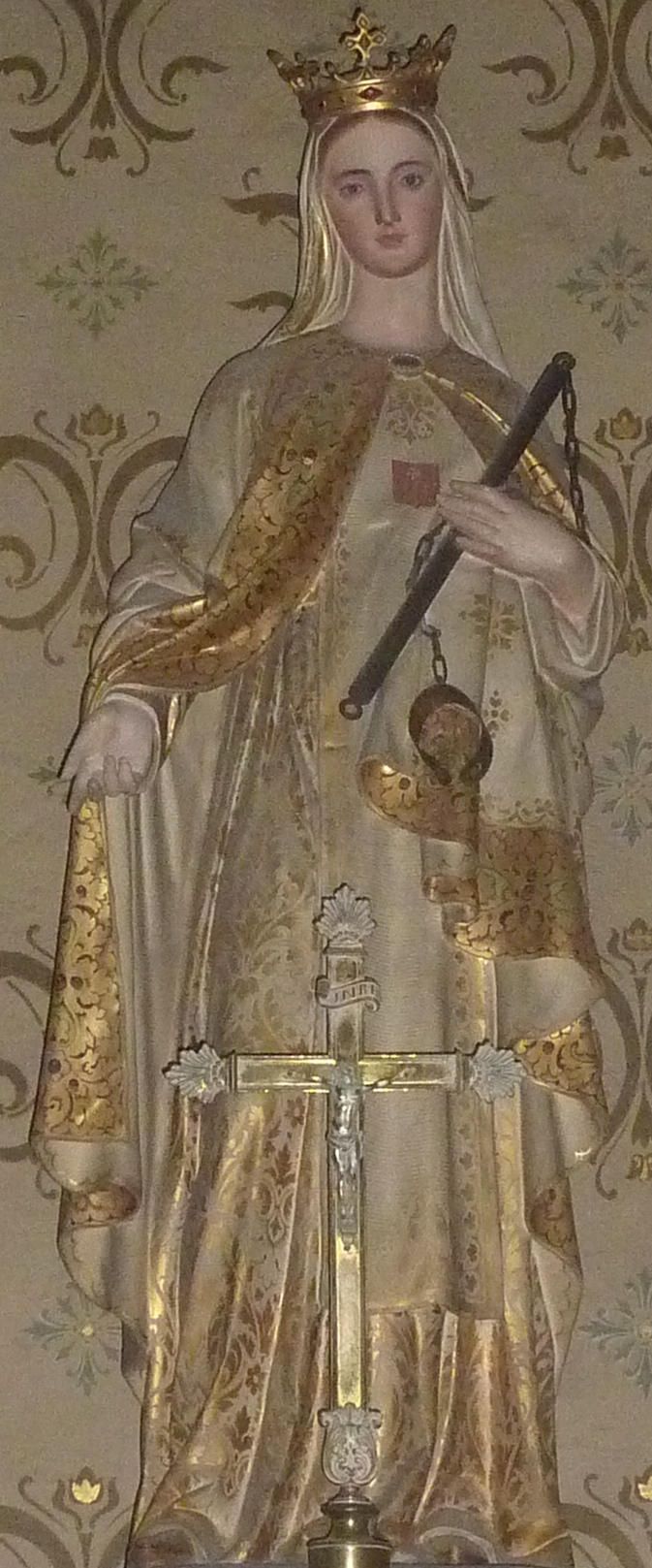 Notre Dame de la Merci église Sainte-Eulalie de Montpellier